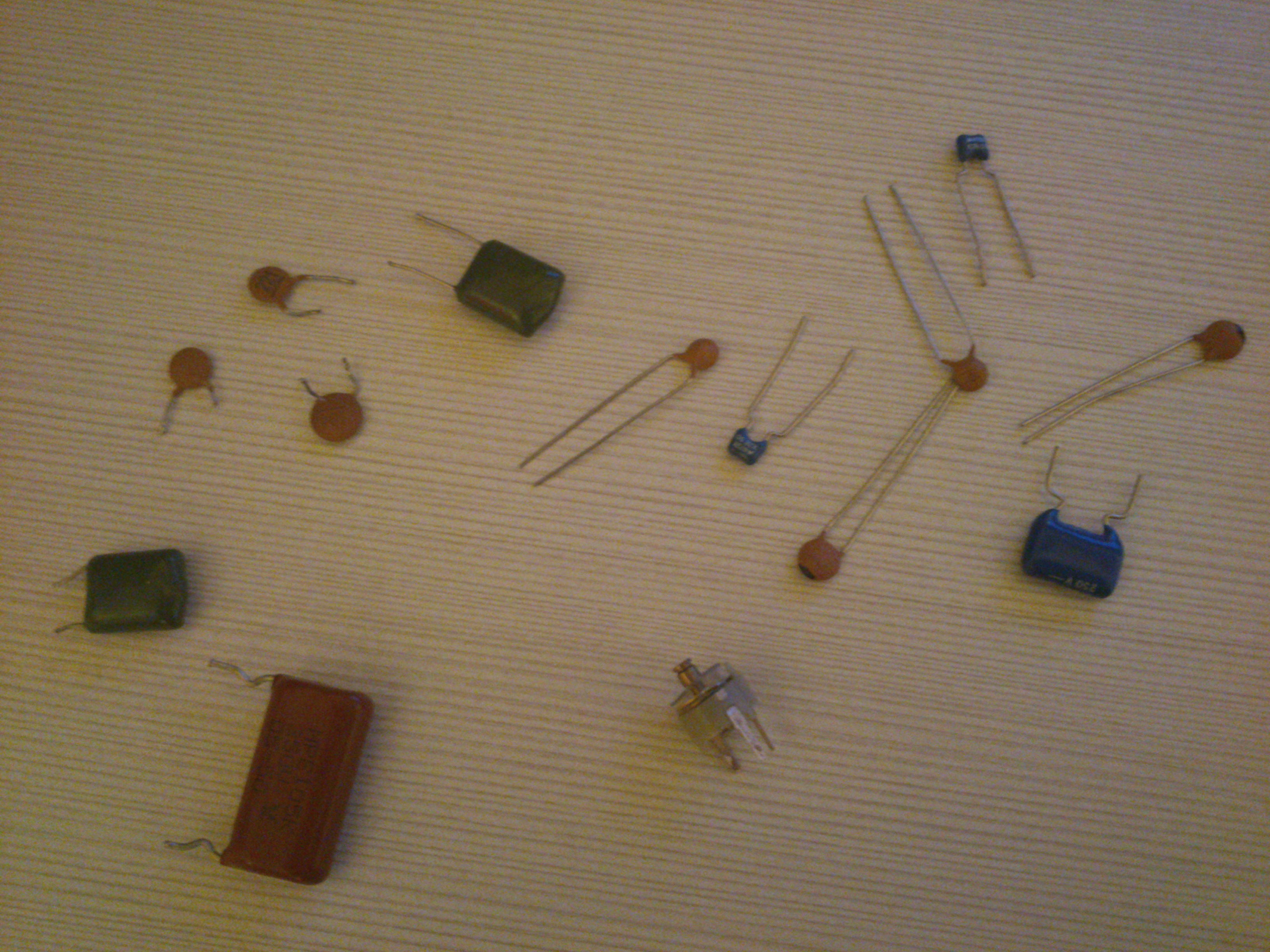 Condesadores Bipolares